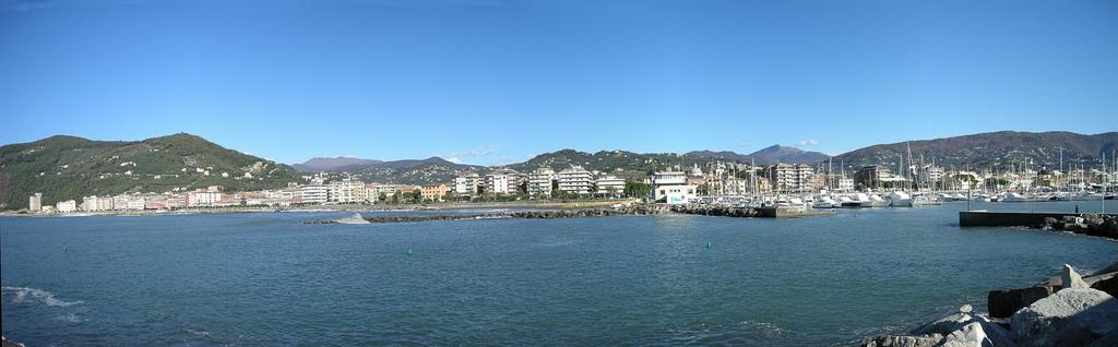 Panorama di Chiavari dal porto cittadino